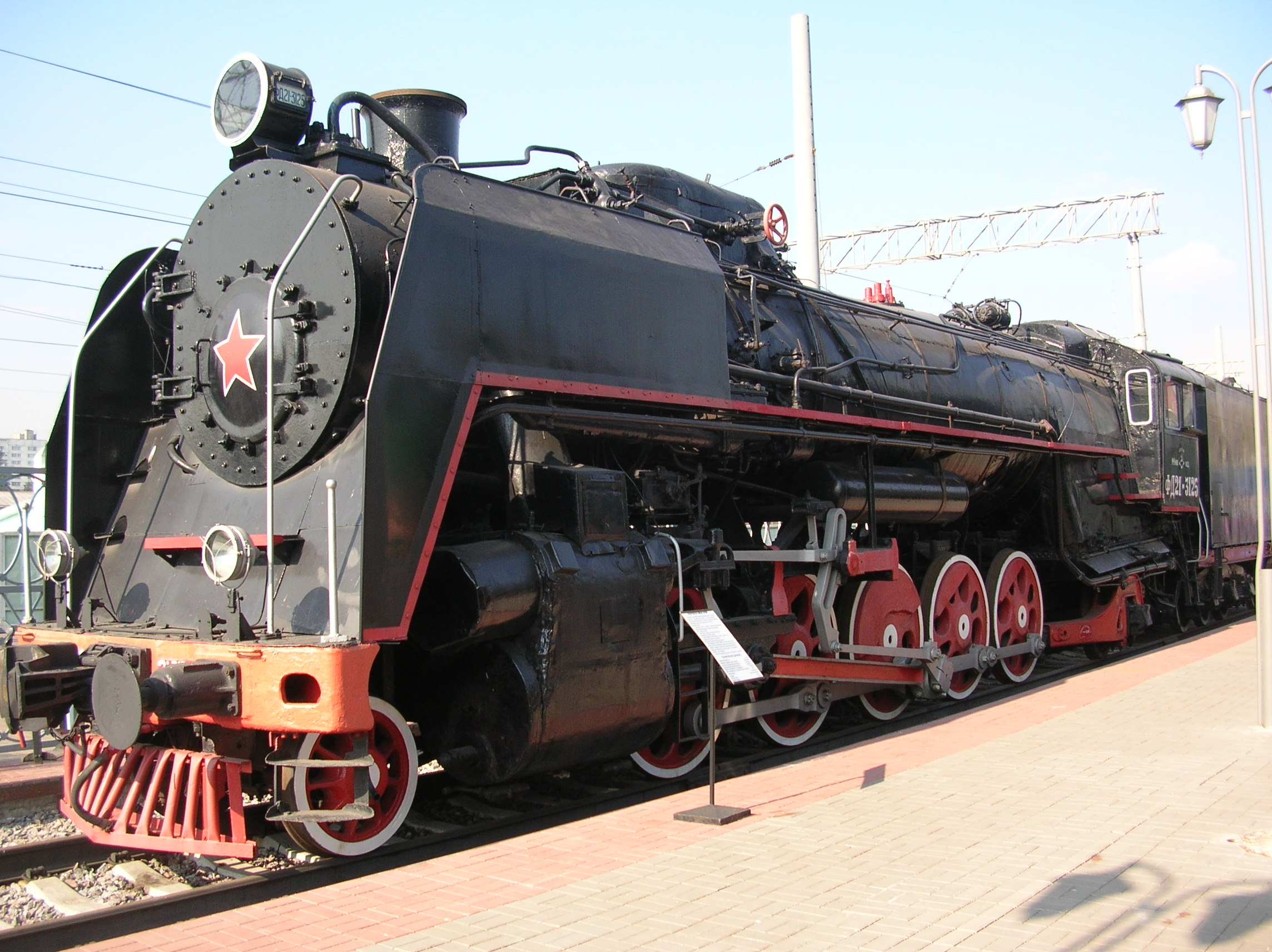 Russian steam locomotive ФД. Moscow railroad museum